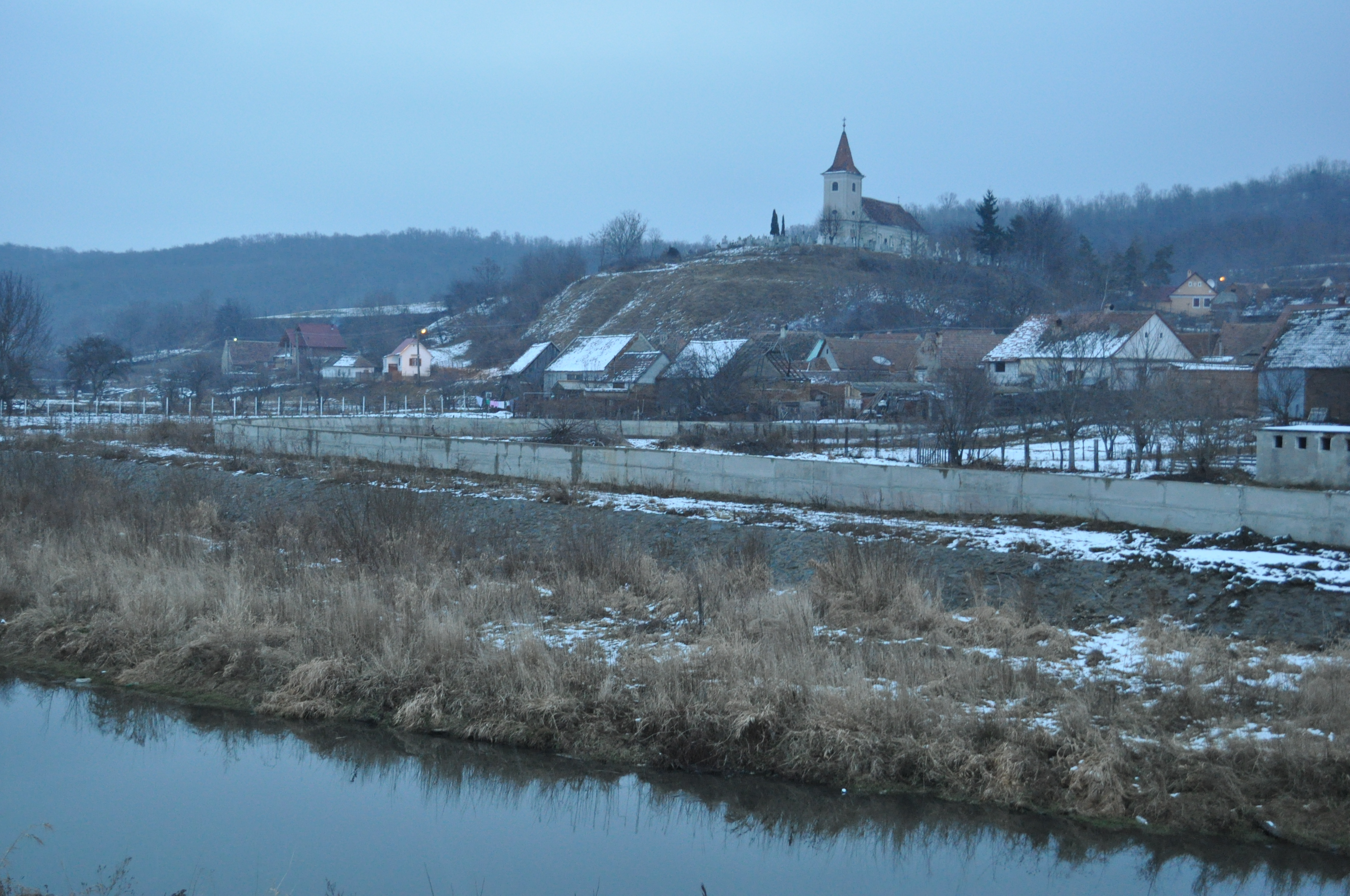 Biserica "Sf. Nicolae" din Mohu, județul Sibiu